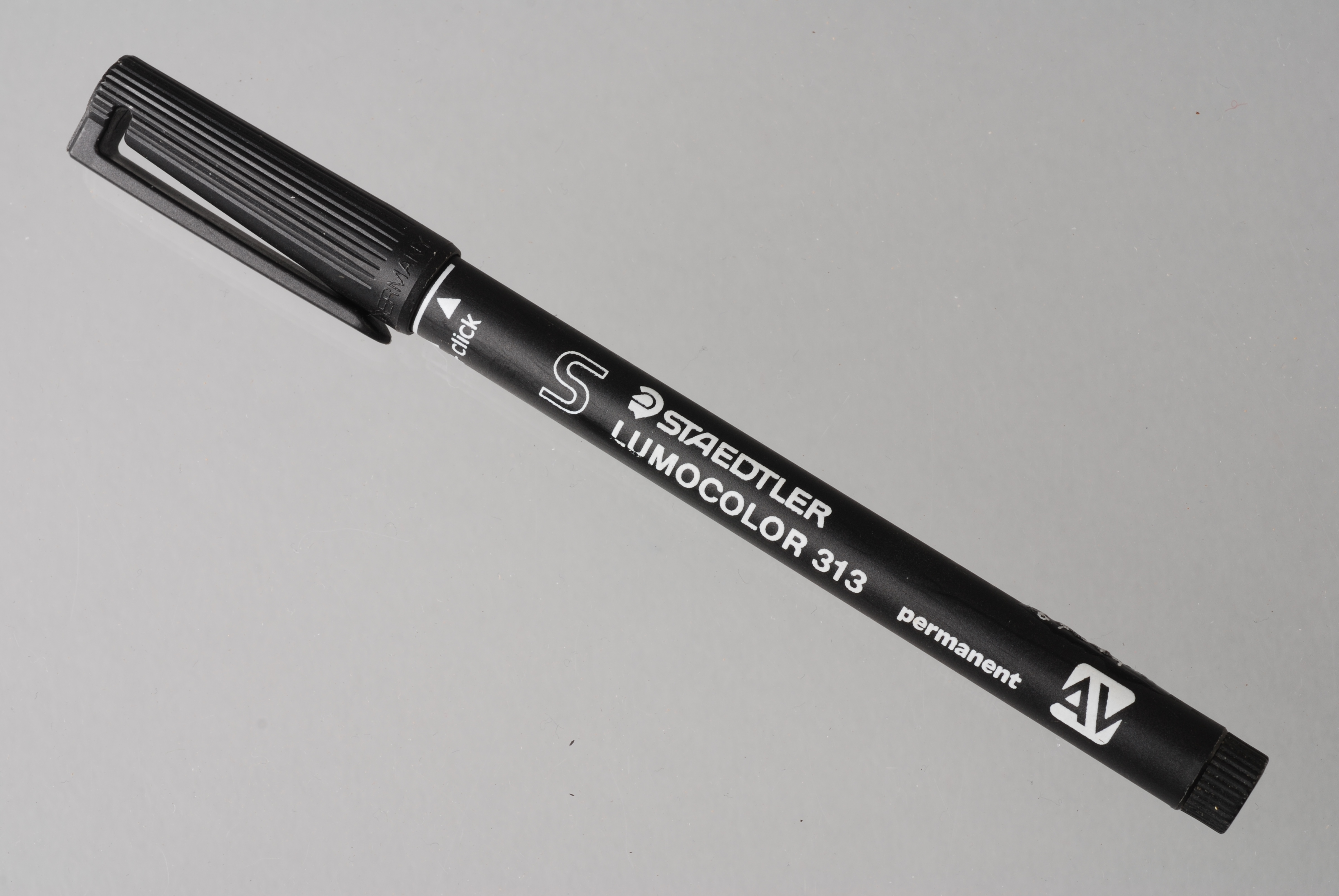 Objectgegevens Titel: Watervaste zwarte “STAEDTLER” pen of stift Beschrijving: Cilindrisch. Zwart. Dop en laatste eindje van de pen zijn geribd. Op de pen met wit aangebrachte tekst. Trefwoorden: pen, stift, schrijfgerei Opschrift / merk: Transfer: "Staedtler Lumocolor 313". Vervaardiger: fabrikant: fa. Staedtler Plaats vervaardiging: Duitsland Datering: 1980 - 1985 Materiaal: kunststof Afmetingen: (cm) hg 14,2 / br 1,7 / dp 1,0 Associatie: schrijven Inventarisnr: Museum Rotterdam 67014